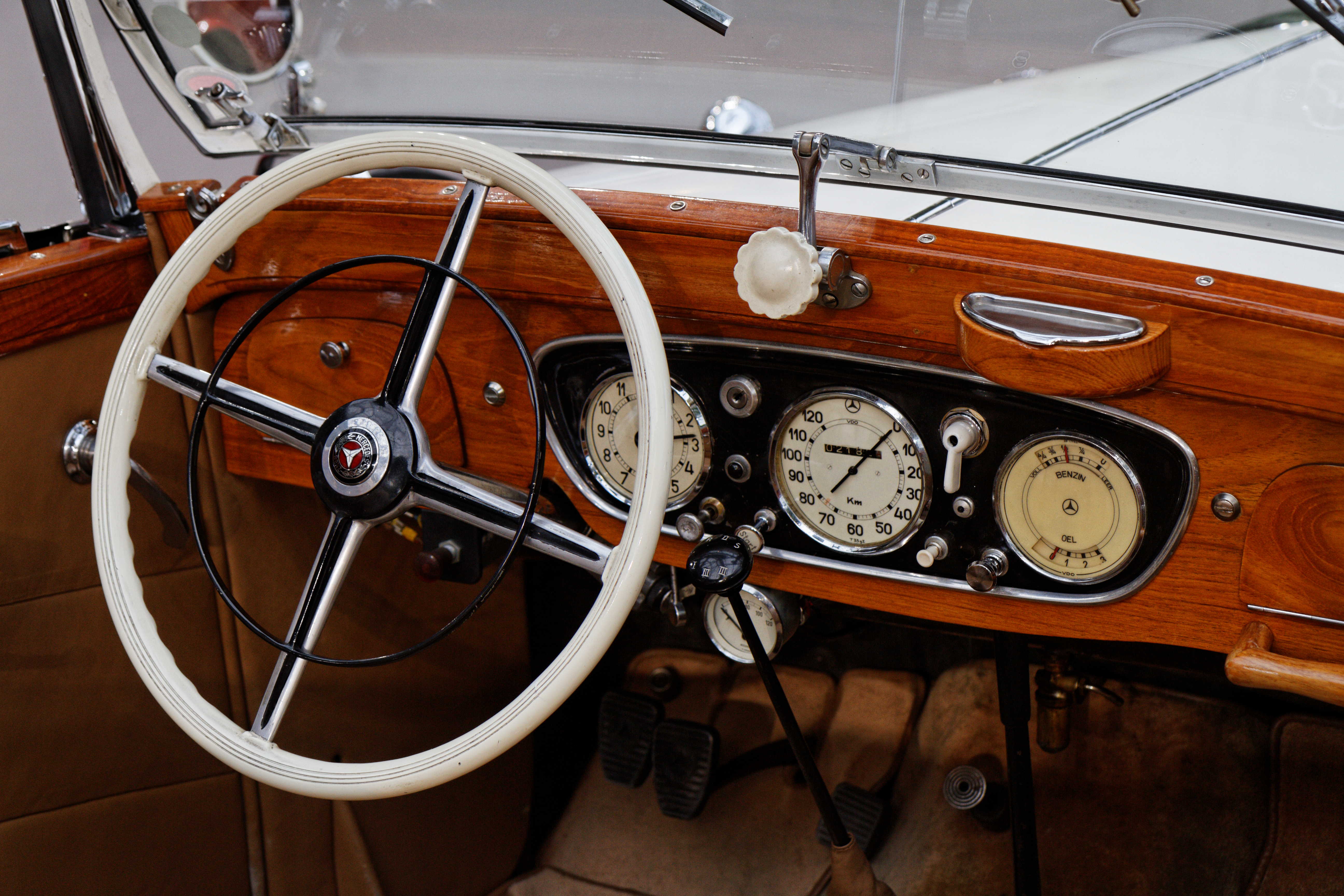 Une Mercedes-Benz 200 cabriolet B au Grand Palais lors de la vente Bonhams en février 2014.